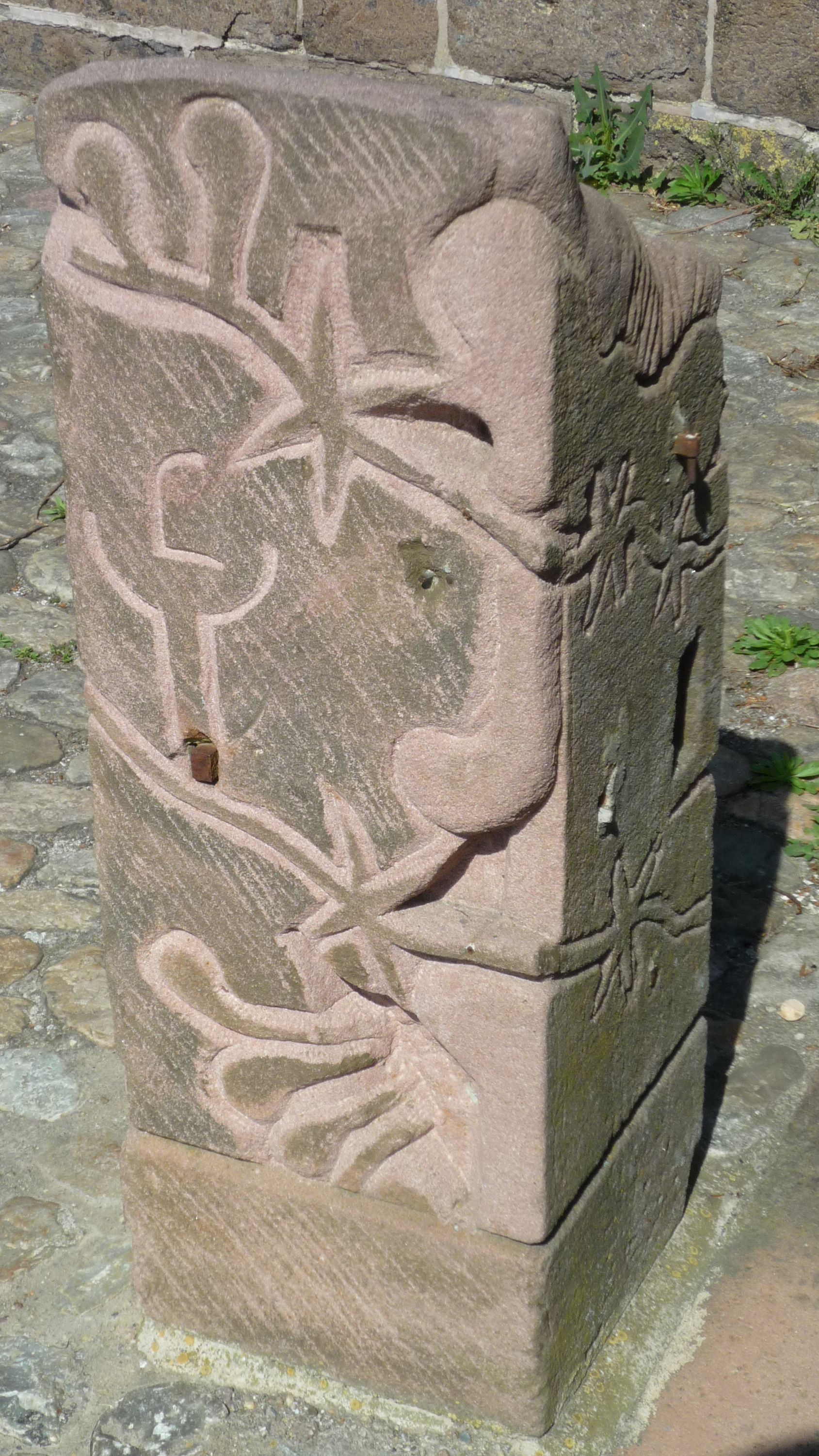 Erinnerungsstein in Breisach. Die zweite Hälfte befindet sich am Mahnmal Neckarzimmern